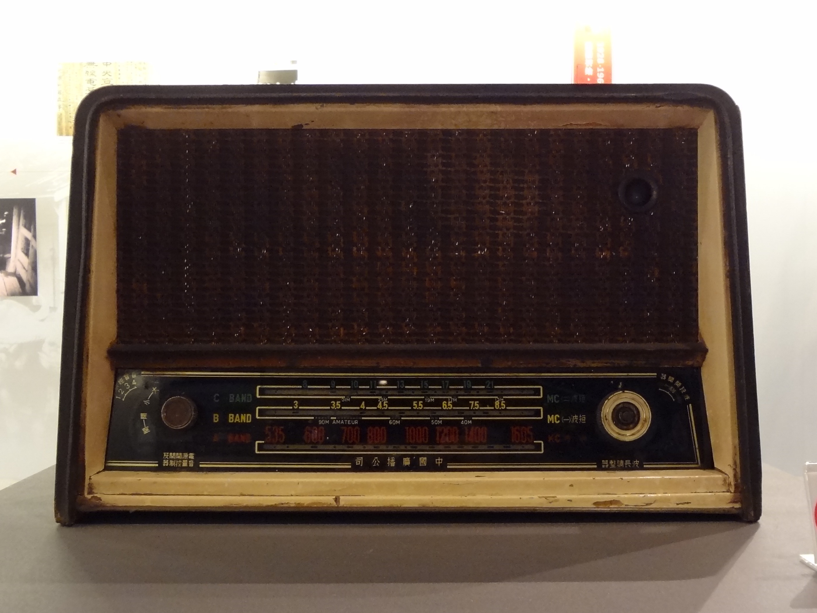 松山文化創意園區「金鐘五十．響 特別展」展示品：1950年中廣牌真空管收音機50-HHE6A。